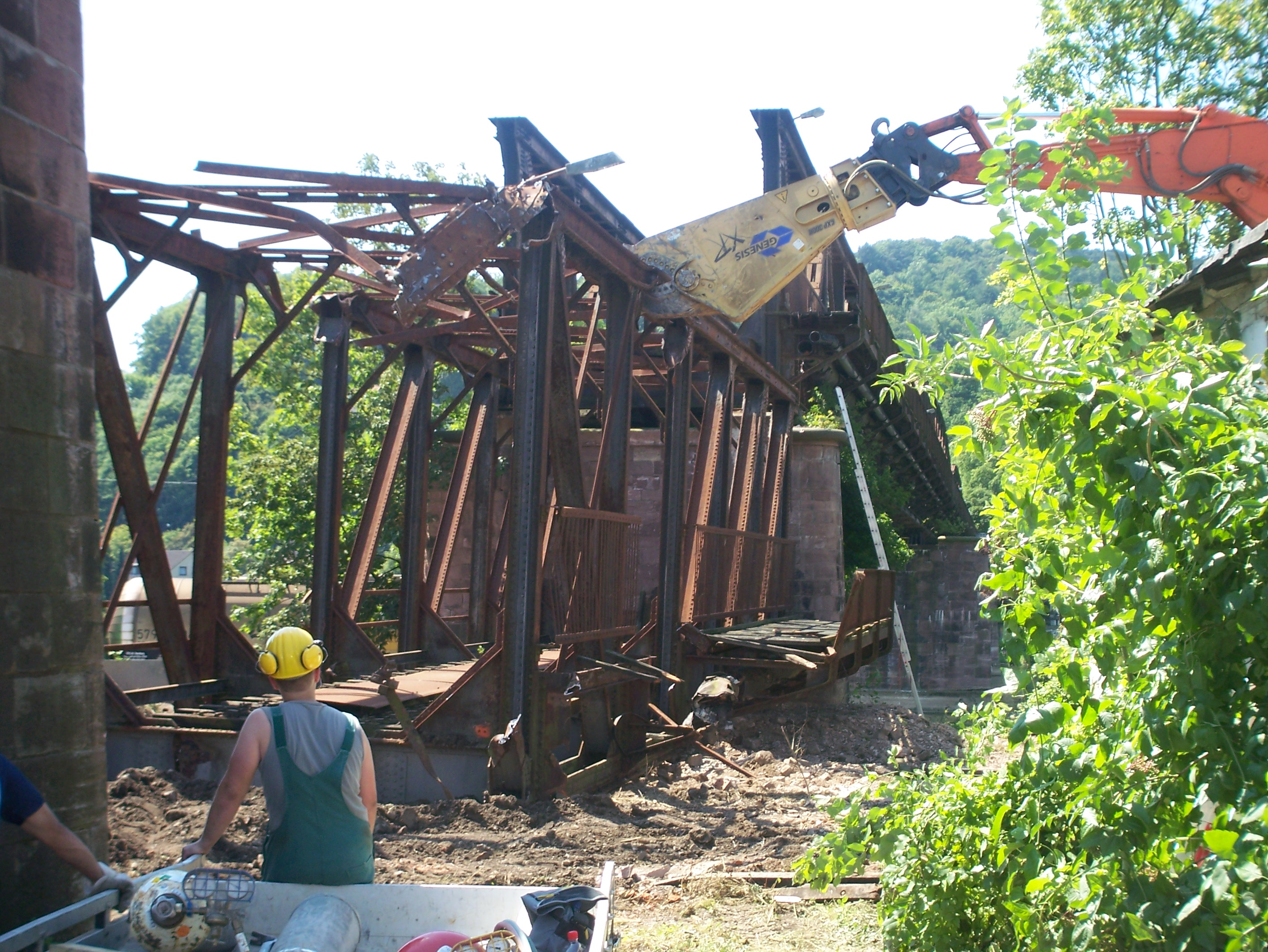 Abriss der alten Eisenbahnbrücke über die Weser in Hameln.